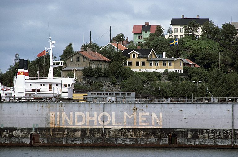 Båthamn med villabebyggelse i bakgrunden.